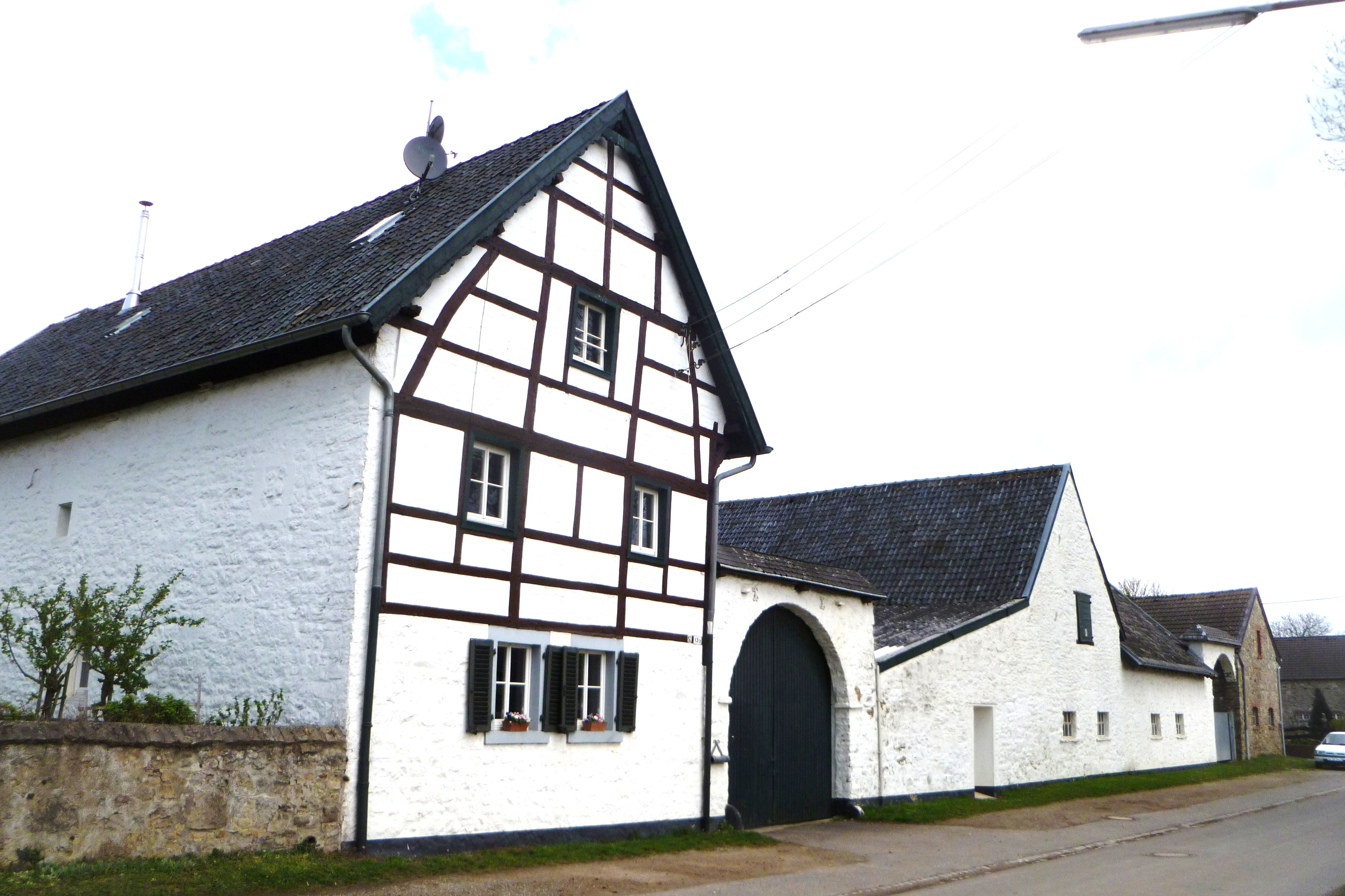 Baudenkmal in Aachen-Walheim